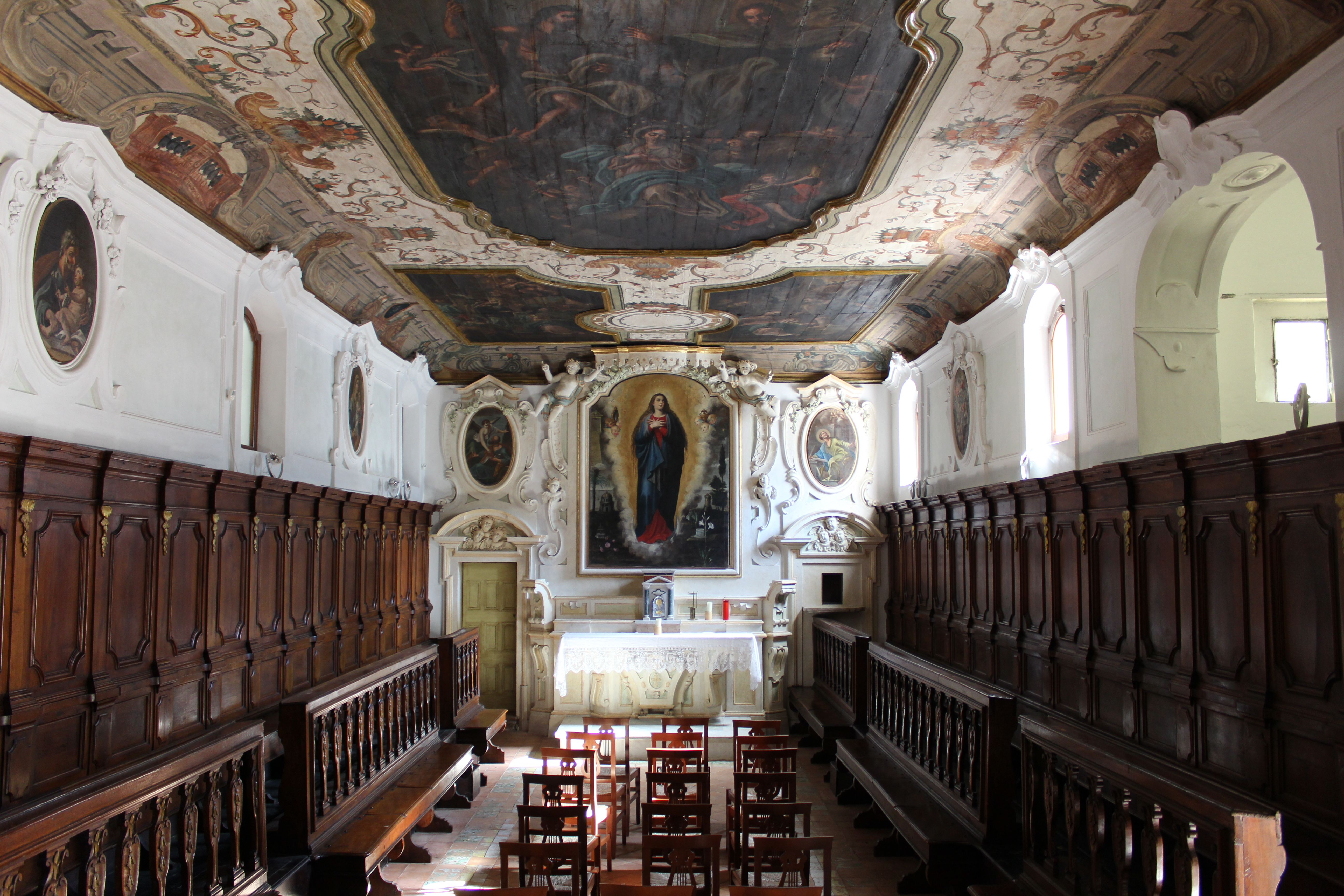 Congrega della Santissima Immacolata, del XXVII secolo, situata di fianco alla Chiesa della SS. Annunziata